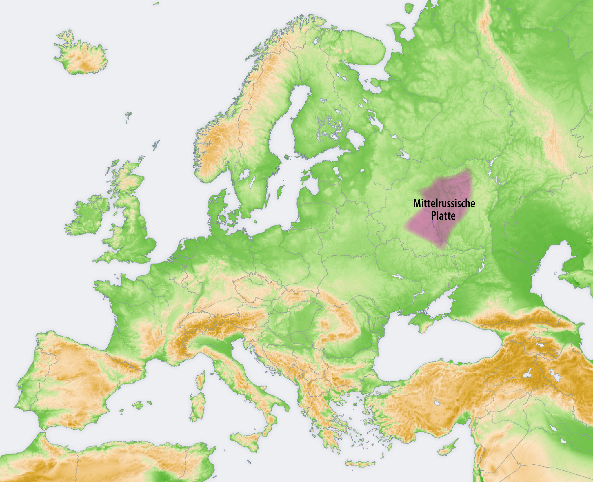 Landschaften der Osteuropäischen Ebene: Mittelrussische Platte